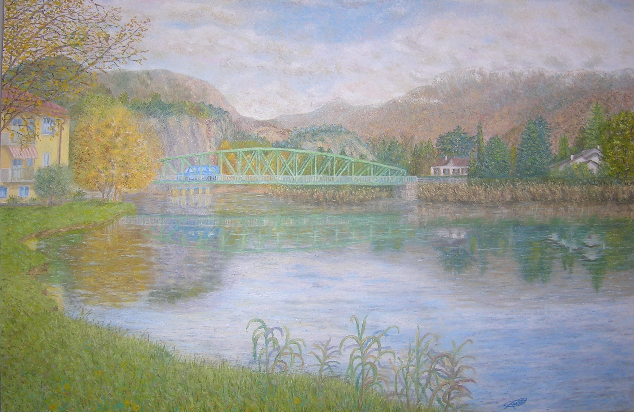 Ponte di Ravazzone sul fiume Adige, Comune di Mori, Trentino Alto Adige, vista sud ritratta dal Maestro d'Arte Renato Restelli, antecedente al restauro.